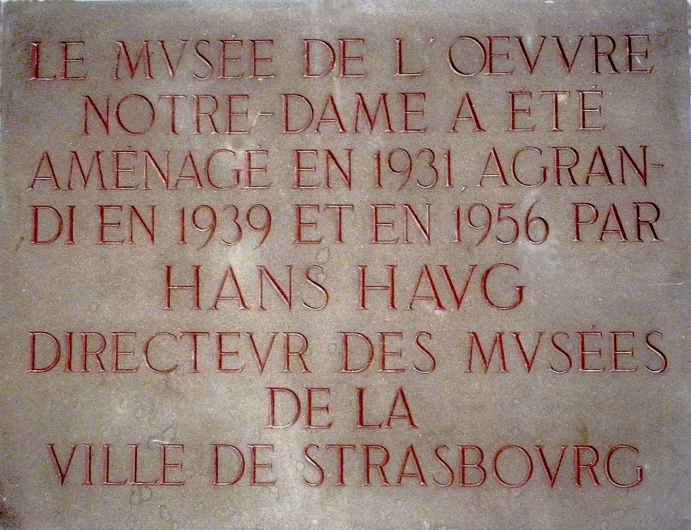 Plaque en grès dédiée à Hans Haug dans l'entrée du Musée de l'Oeuvre Notre-Dame (Strasbourg)